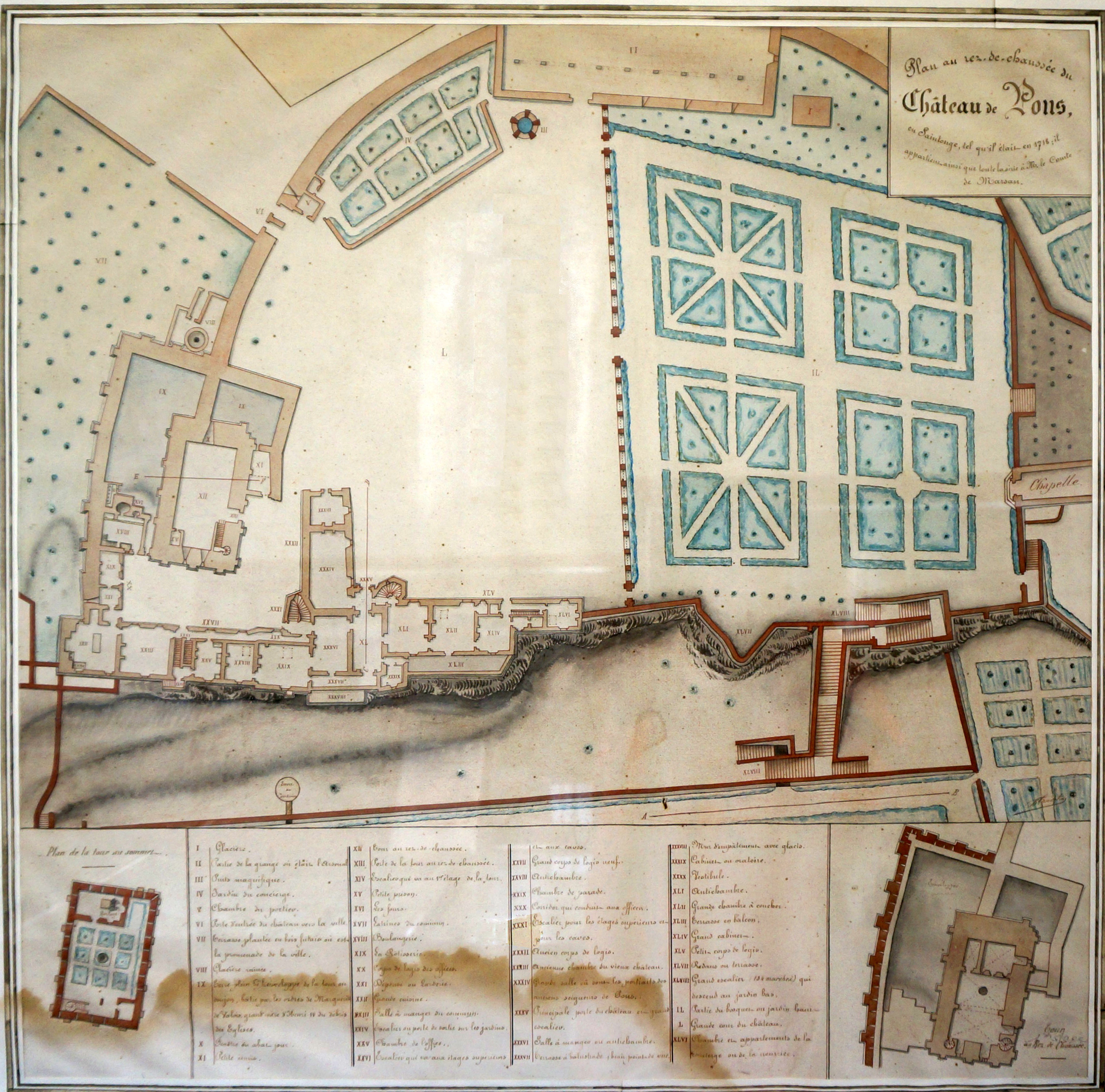 Visible au Musée archéologique de Pons. Plan Marsan de 1718.